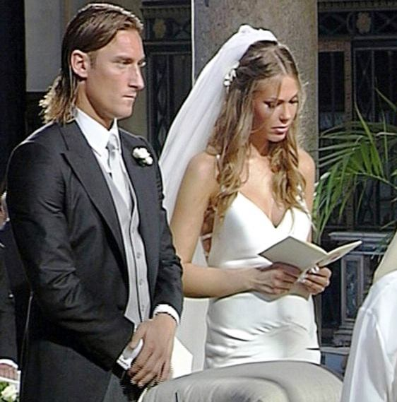 زفاف توتي وبلاسي